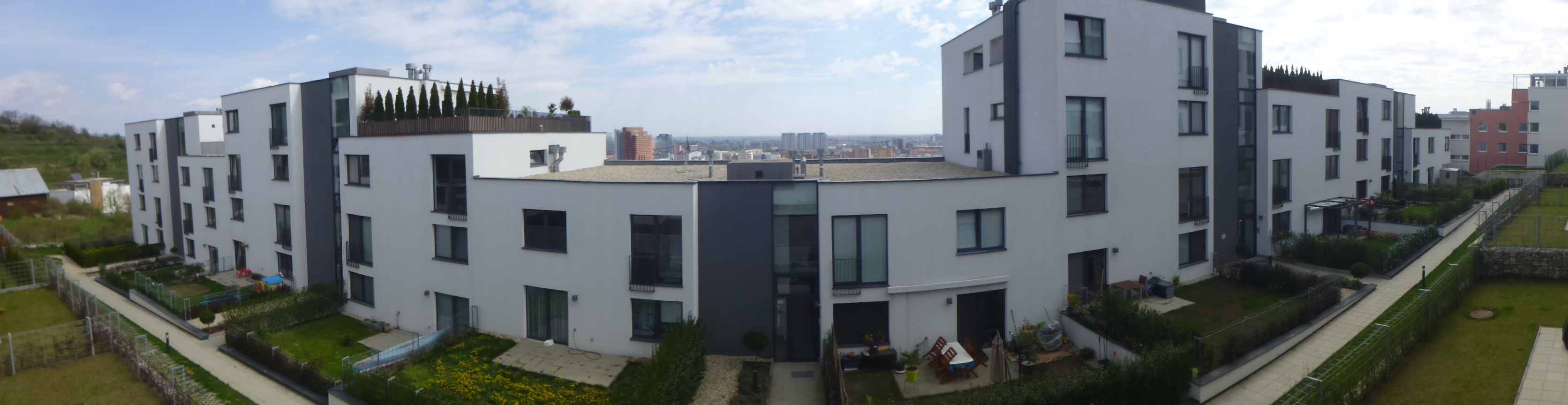 PANORÁMA NA VARTE